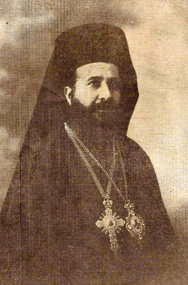 Митрополит Пафский Леонтий